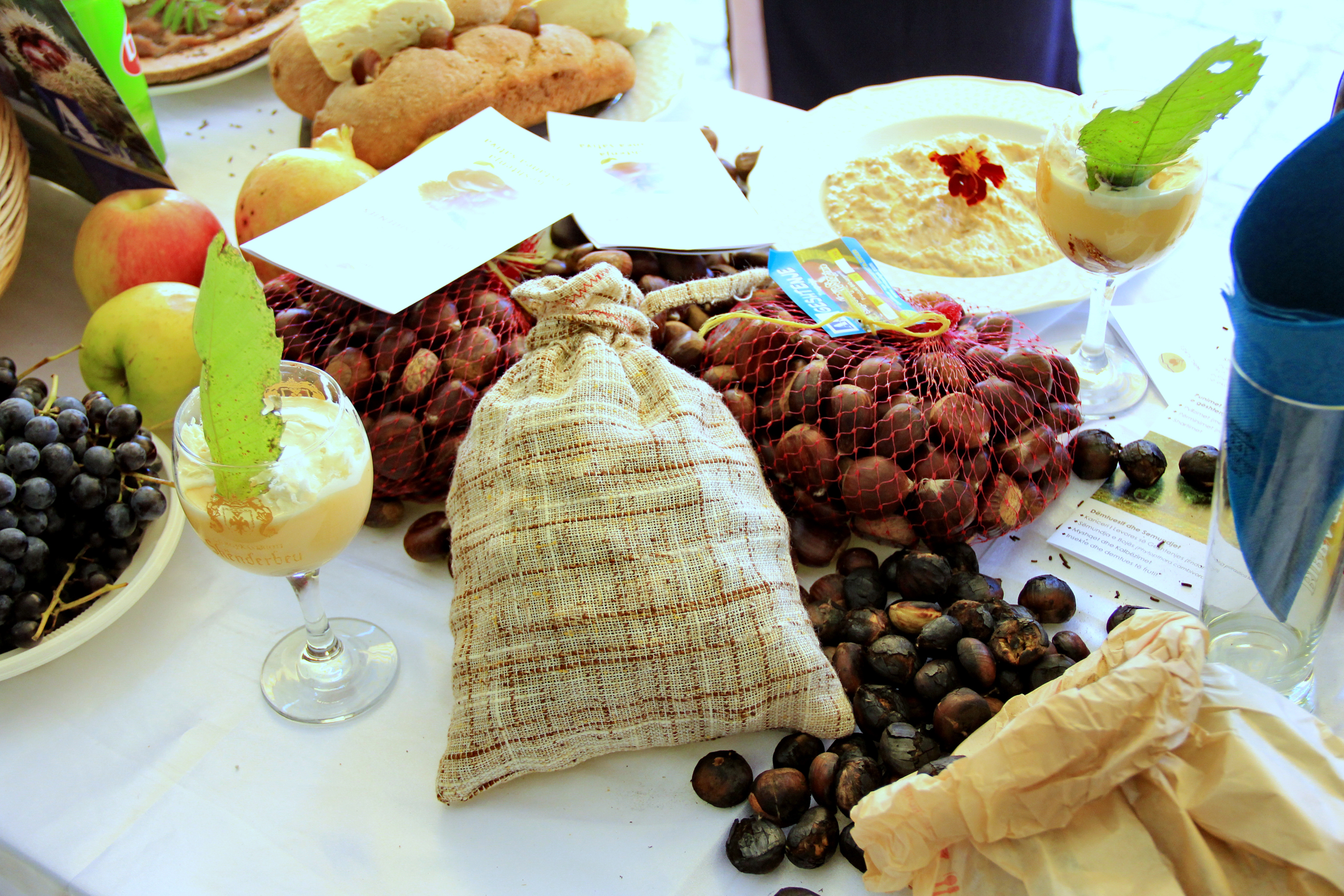 Festa e Gështenjave - Bajram Curr 03